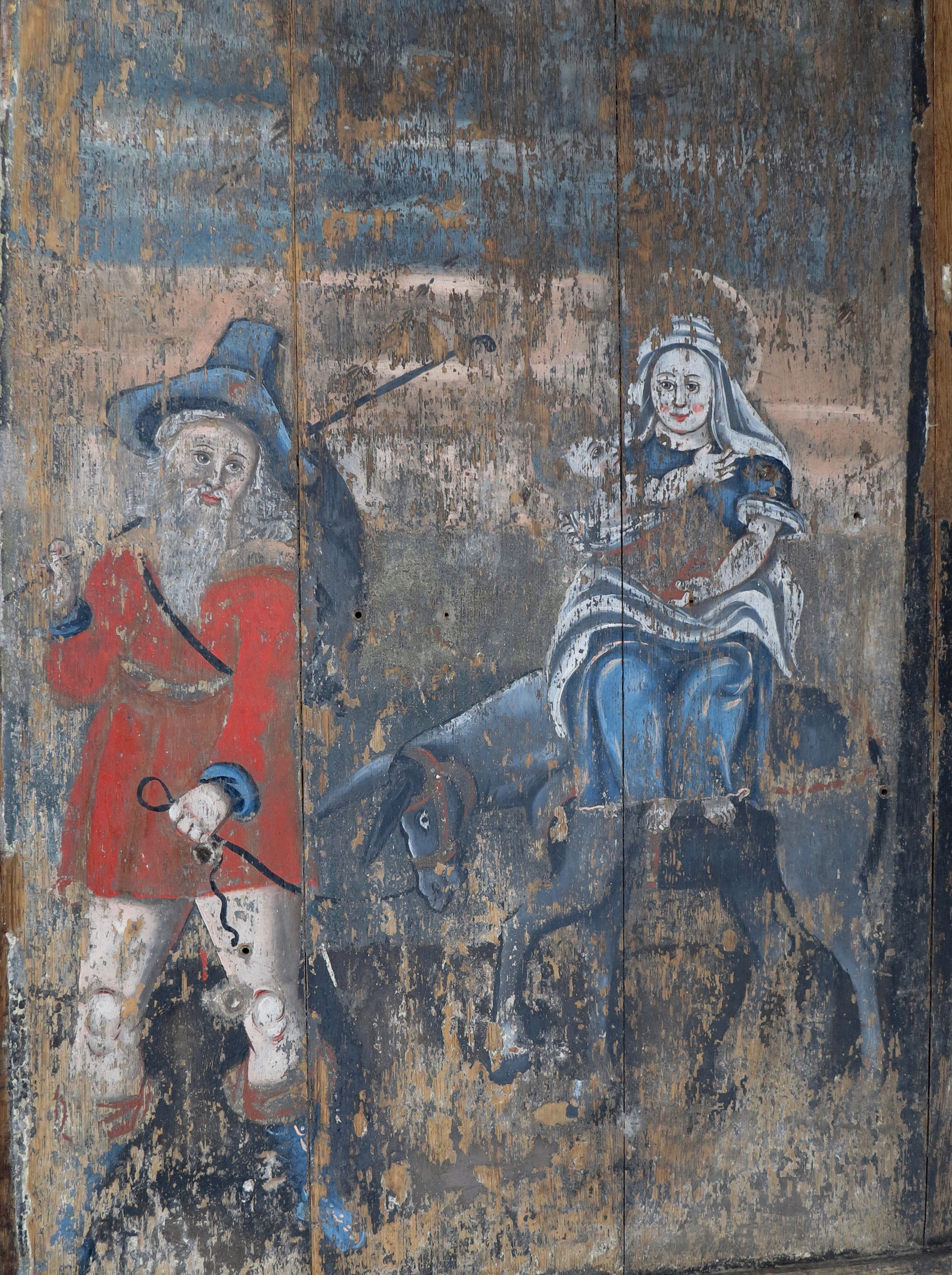 Landkirchener Retabel udenfor: Flugten til Egypten (højre fløj)